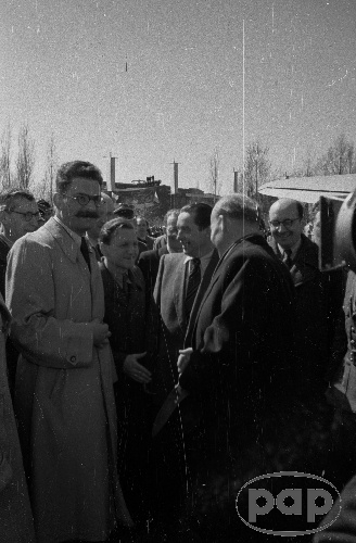 Dąbie, 20 kwietnia 1947. Uroczystości wieńczące Tydzień Ziem Zachodnich (14-20 kwietnia 1947). Powitanie wicepremiera i ministra Ziem Odzyskanych Władysława Gomułki na lotnisku. Nz. m.in. wojewoda szczeciński Leonard Borkowicz (2L), Władysław Gomułka (tyłem, 2P), prezydent miasta Szczecina inż. Piotr Zaremba (1P).